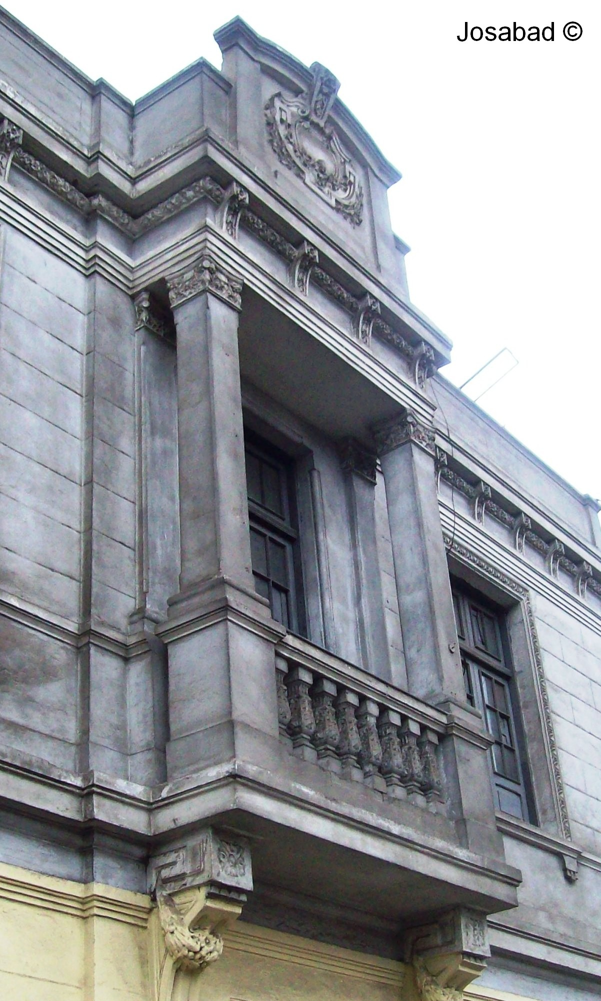 Balcón de casa en la sexta cuadra de la Avenida Bolivia.